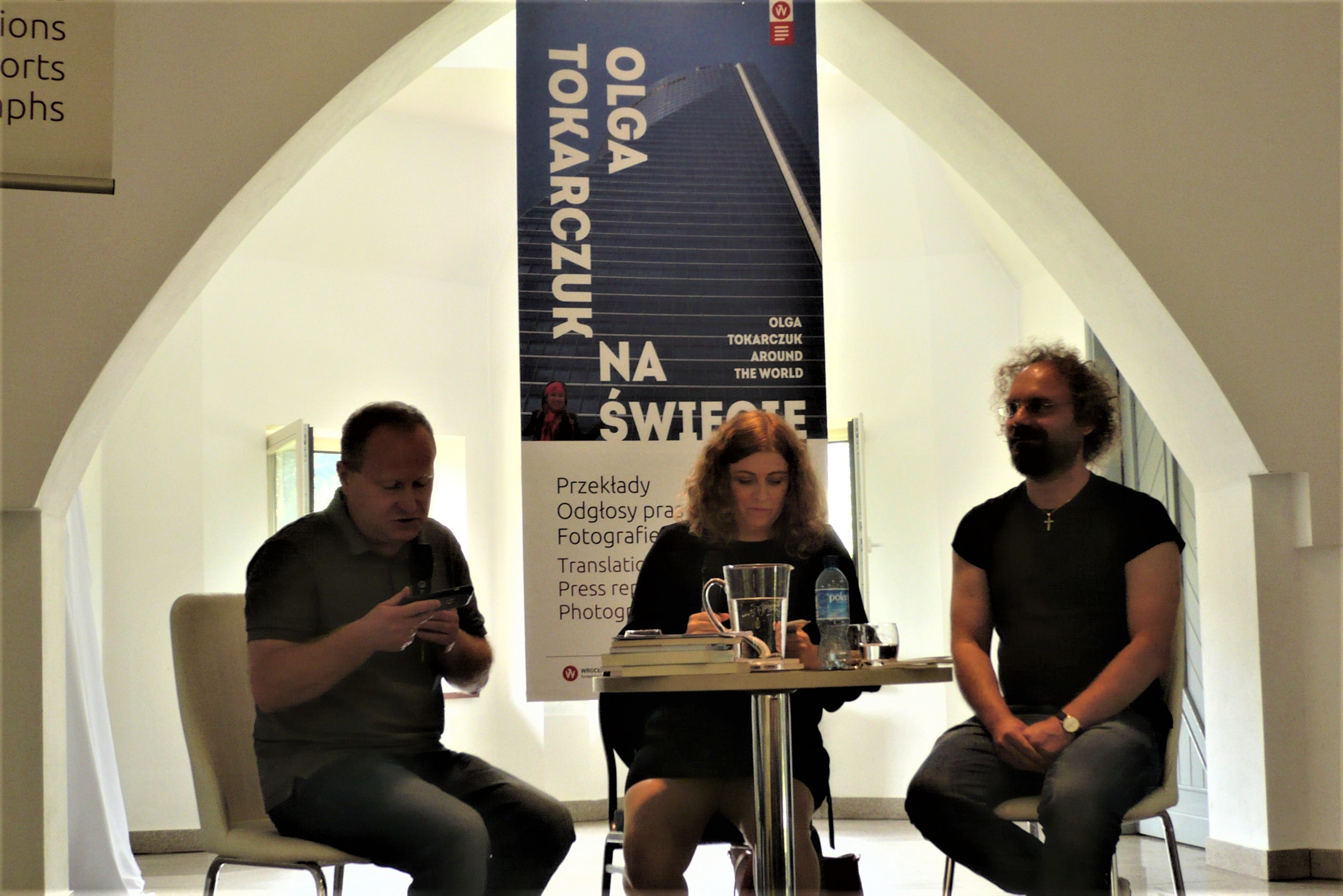 Wioletta Grzegorzewska podczas Festiwalu Góry Literatury, 2017